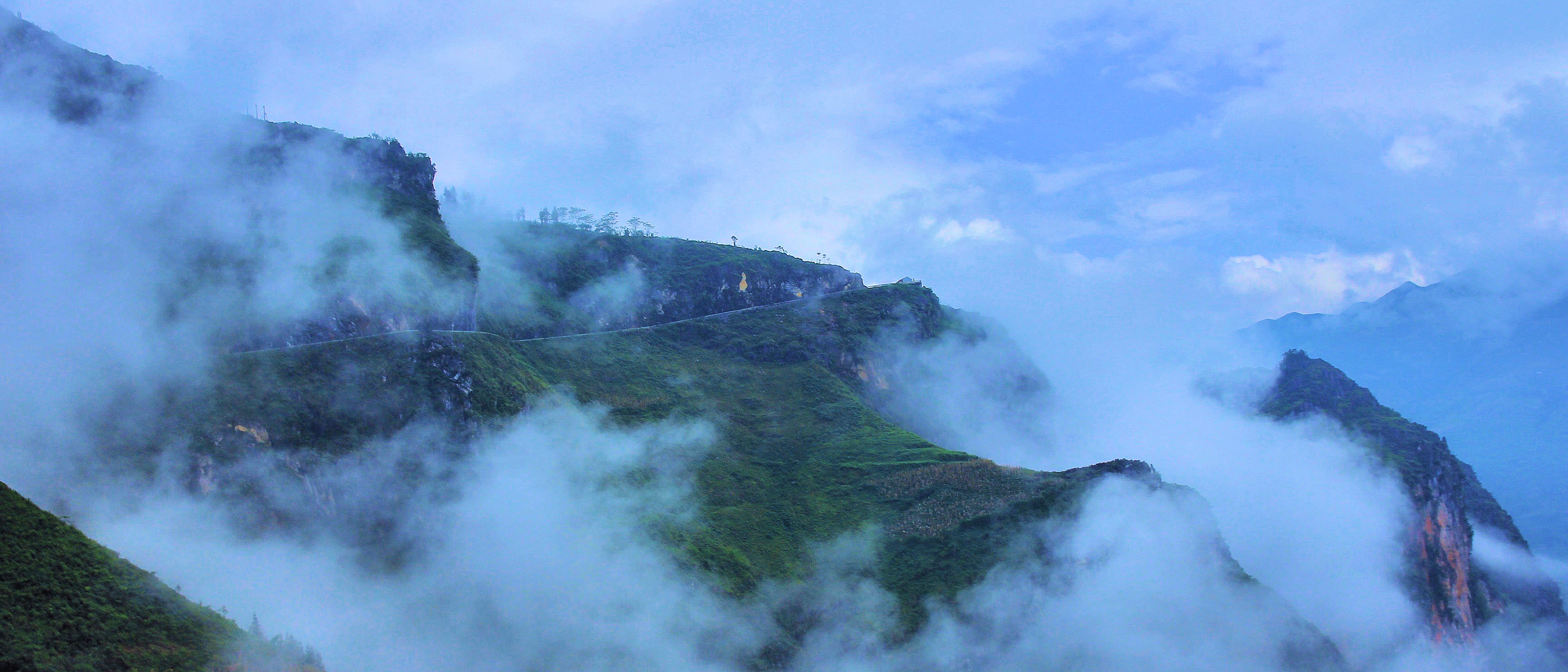 Toàn cảnh và điễm dừng chân (View Point)